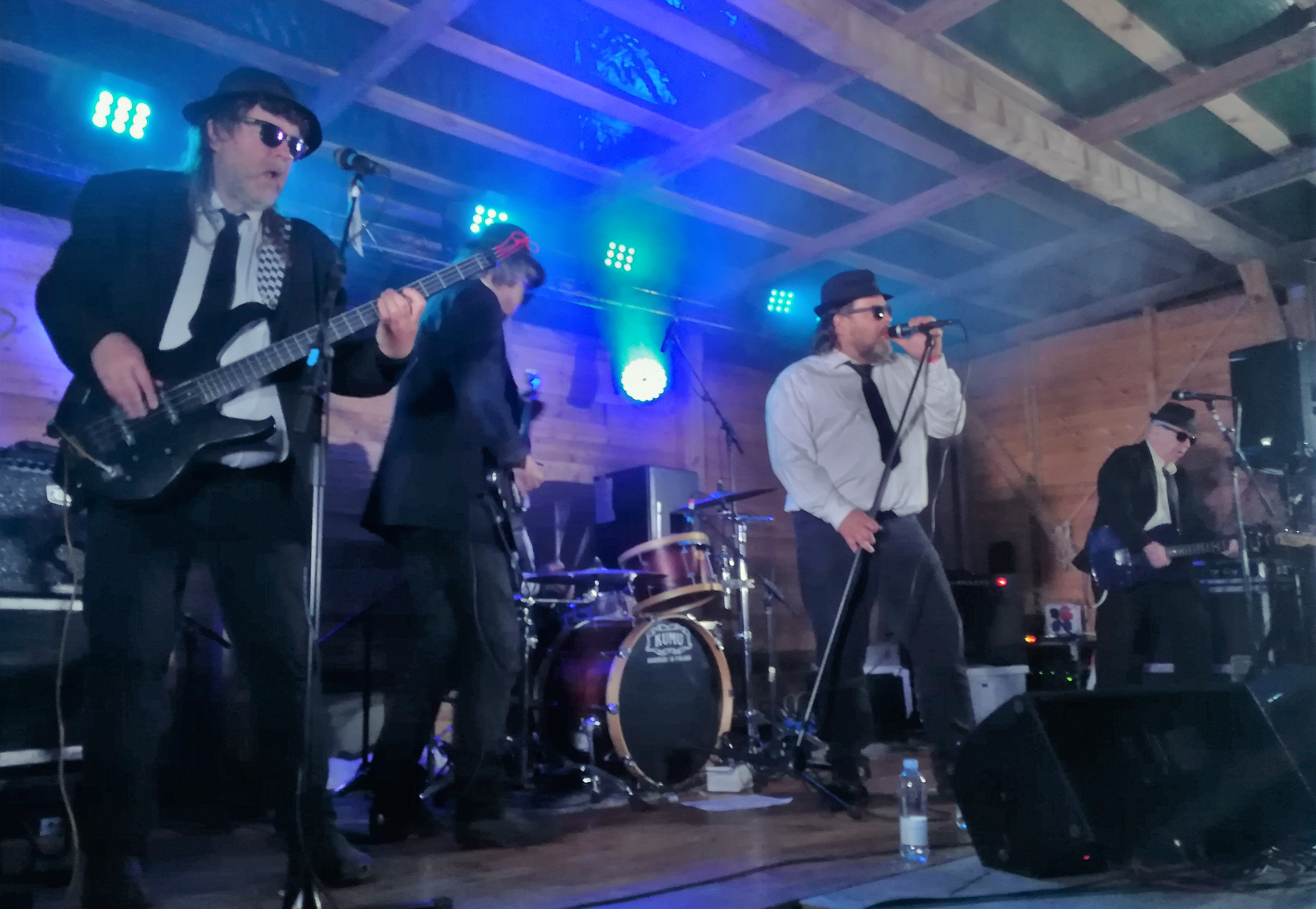 Turo's Hevi Gee 2019 kesällä 2019